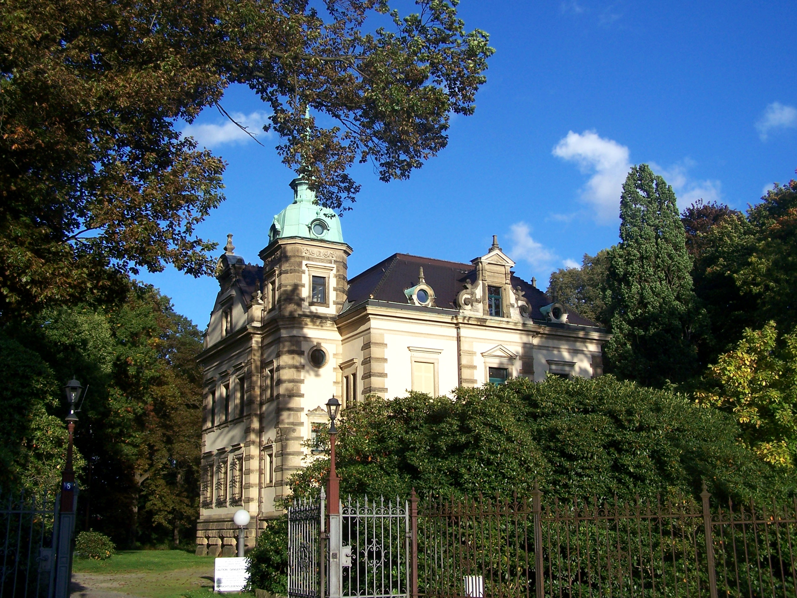 Großröhrsdorf, Großmannstraße 8